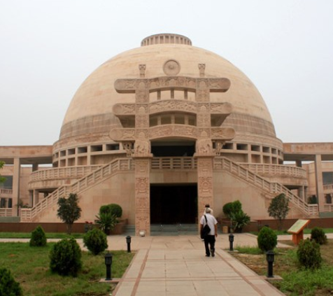 baimasi